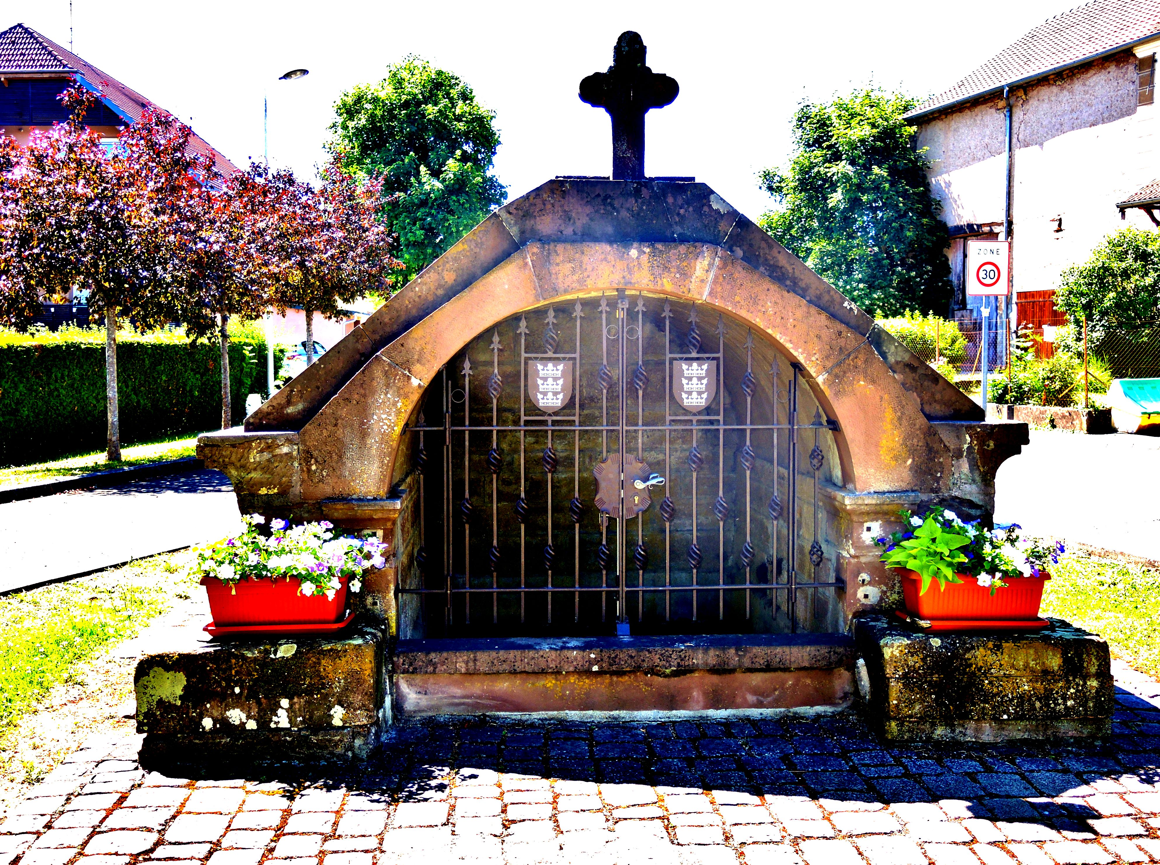 Source-fontaine, au centre du village de Bessoncourt. Territoire de Belfort